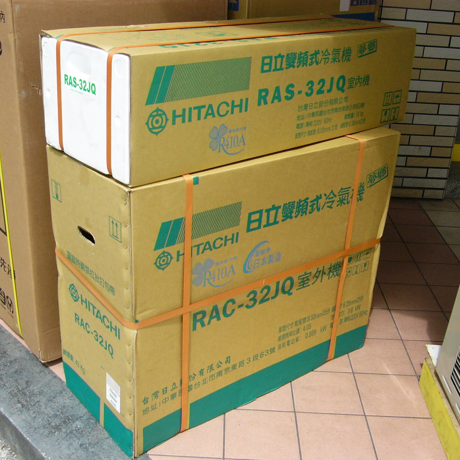 台灣日立分離式冷氣室內機RAS-32JQ外盒與室外機RAC-32JQ外盒